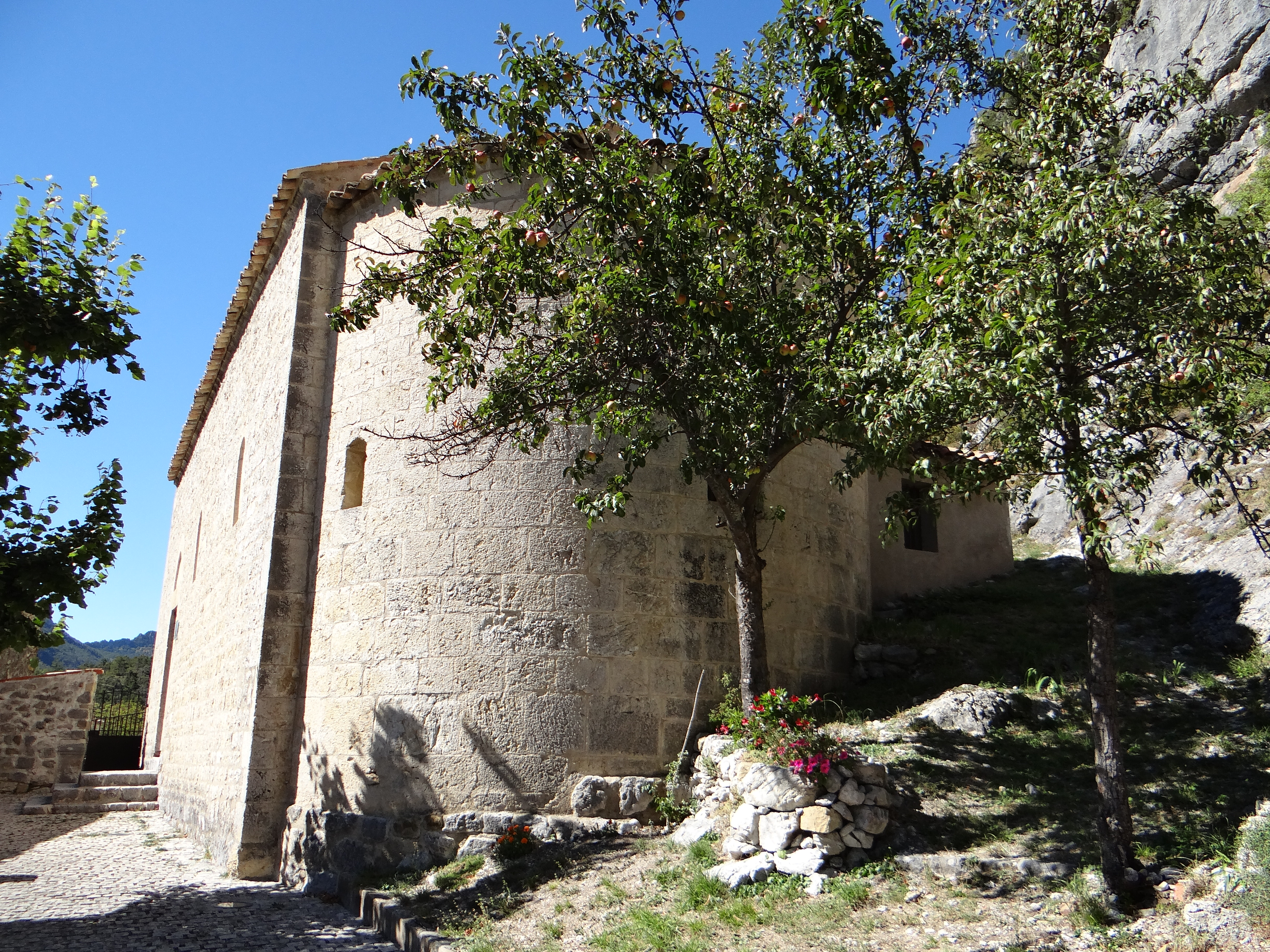 Gars - Église Saint-Sauveur - Abside .